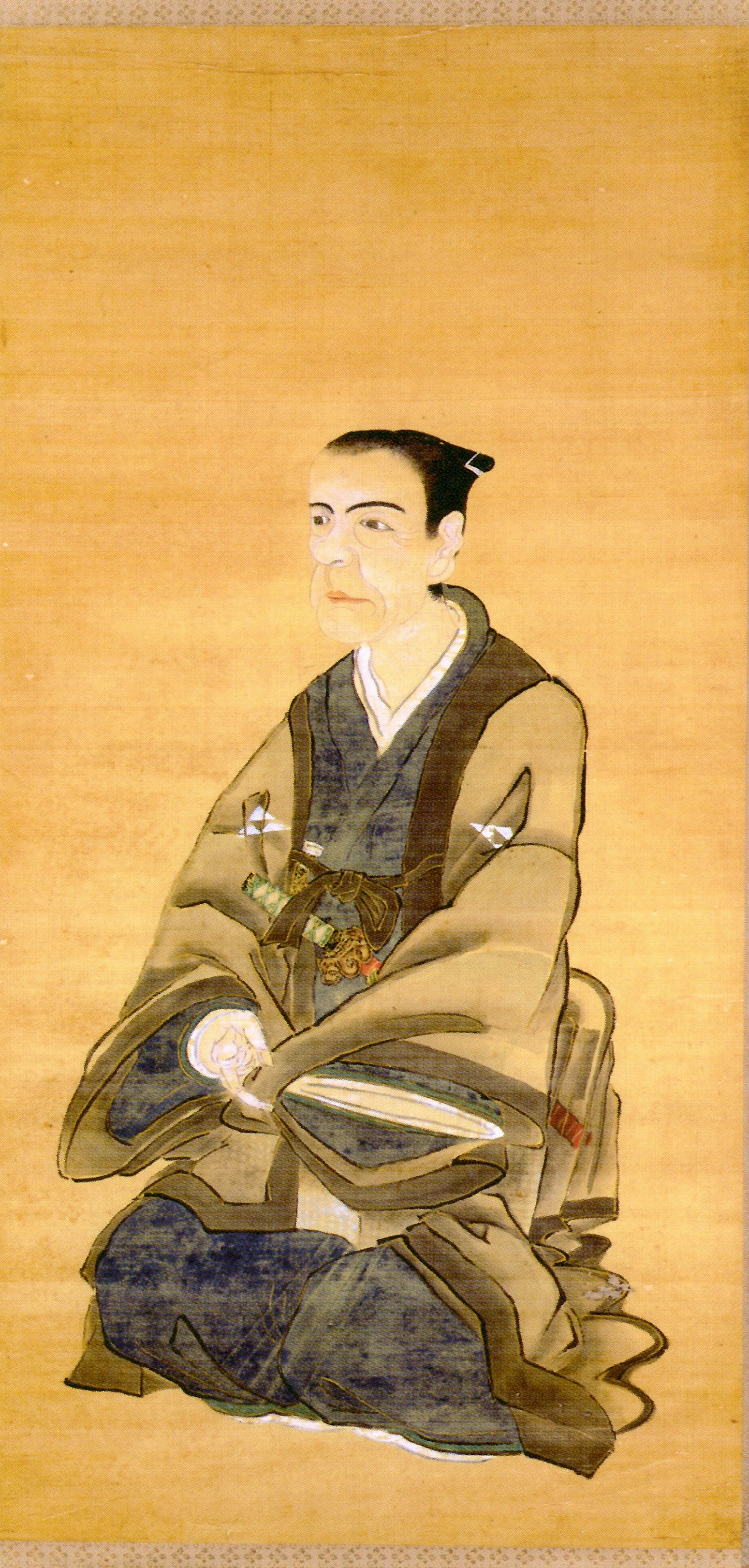 狭山藩主北条氏の先祖の画像。5代藩主北条氏朝か。